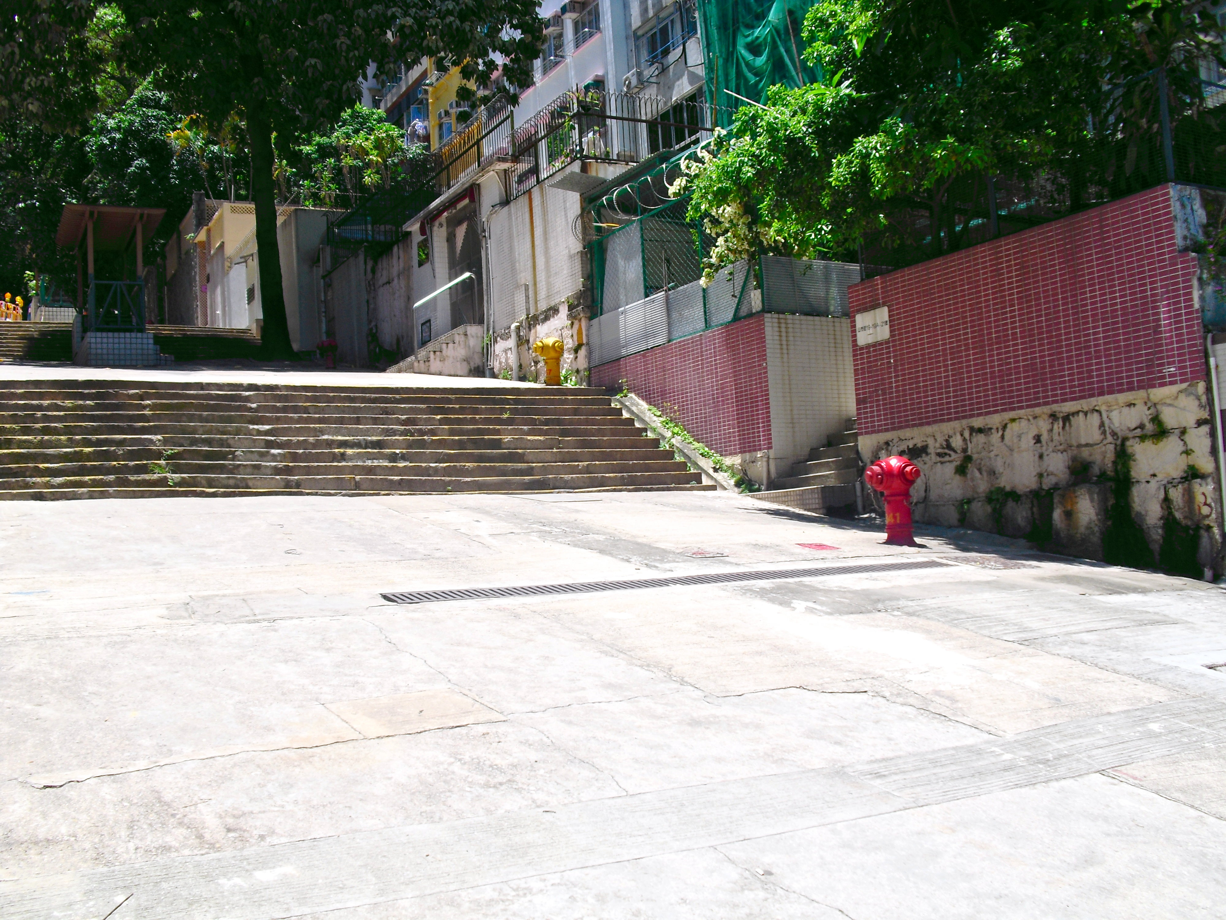 紫蘭臺的舊址